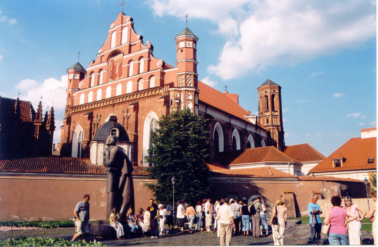 Berdhardiner church & kloster, Vilnius